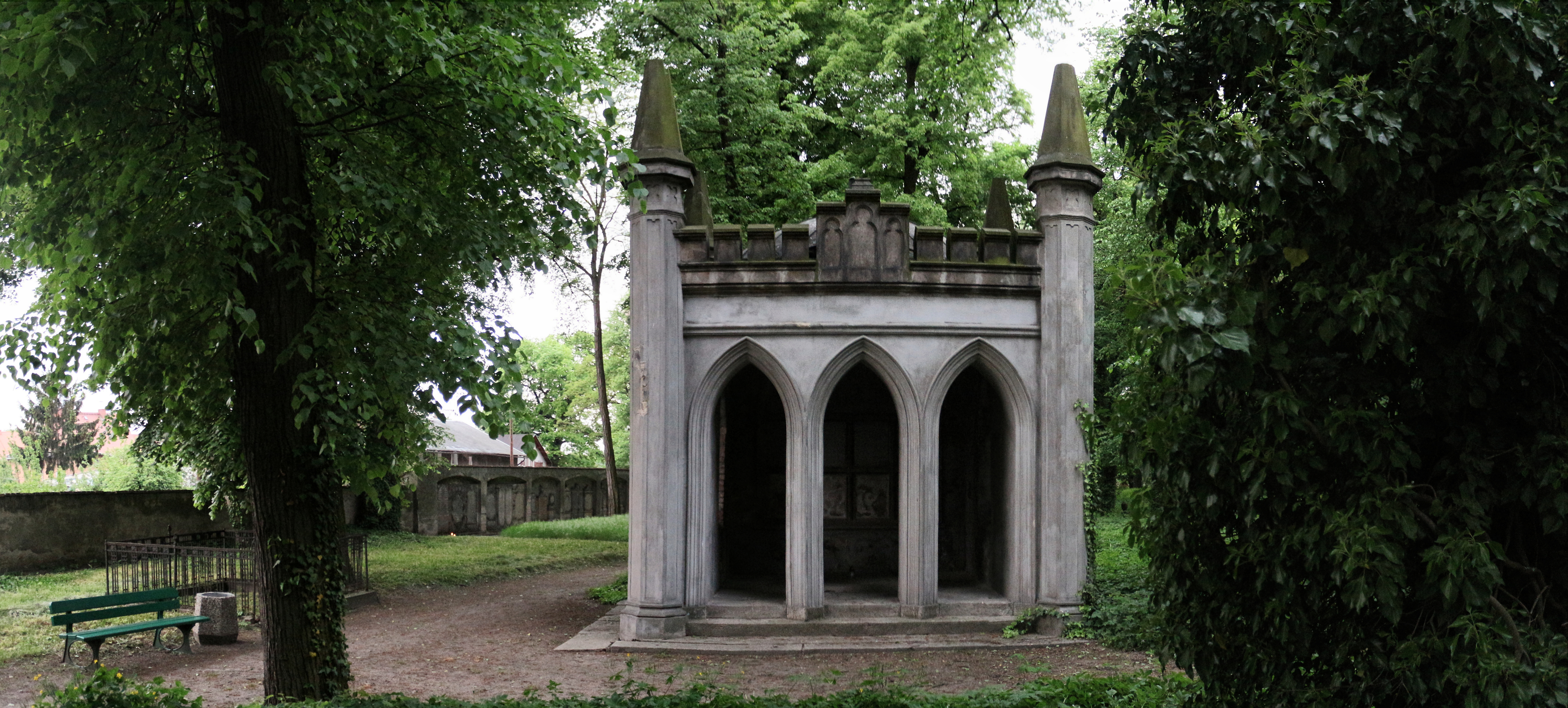 Wschowa, Lapidarium Rzeźby Nagrobnej Kaplica Hoffmann